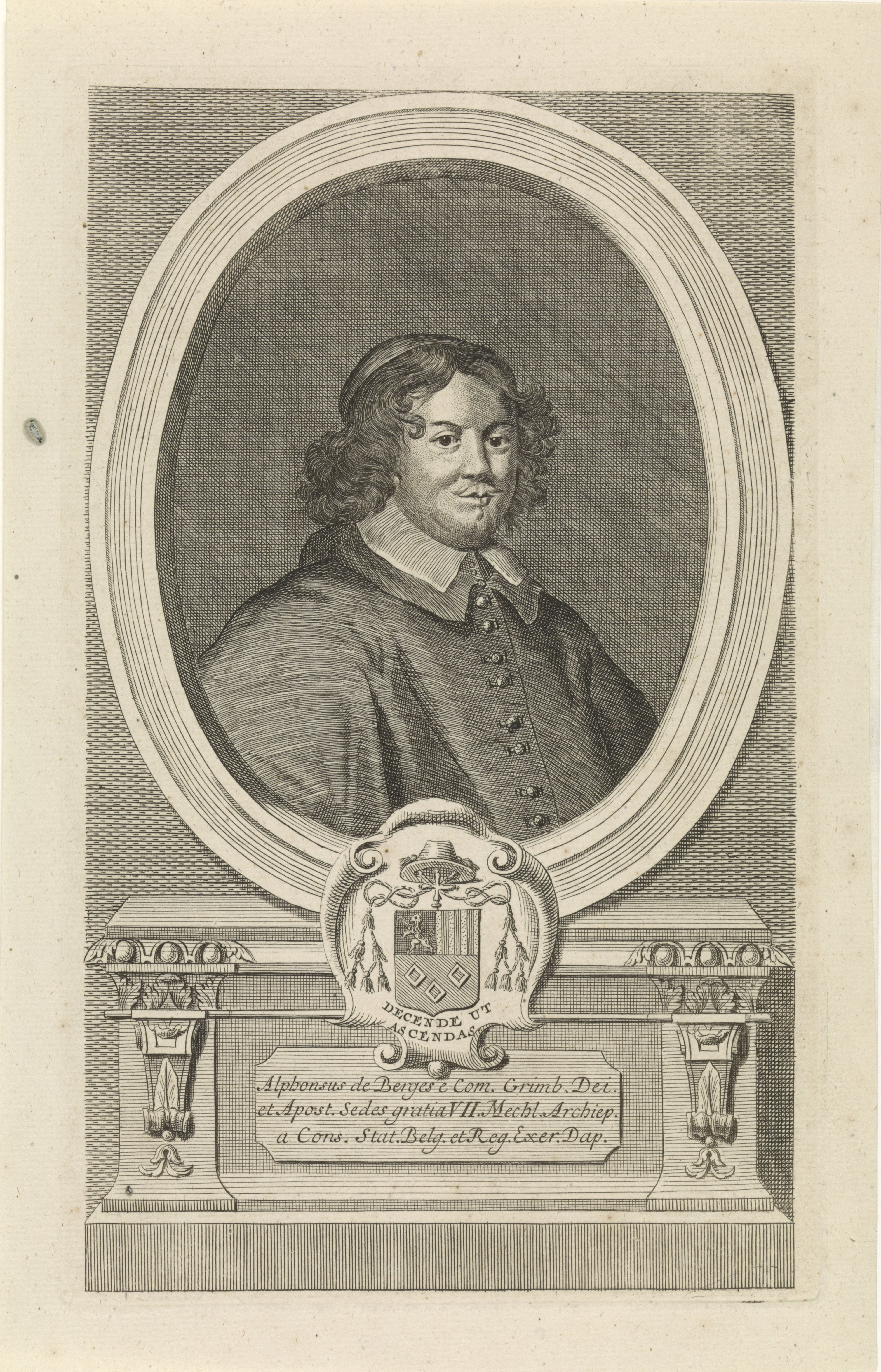 IdentificatieTitel(s): Portret van Alphonse de BerghesObjecttype: prent boekillustratie Objectnummer: RP-P-1912-756Opschriften / Merken: verzamelaarsmerk, verso, gestempeld: Lugt 2228Omschrijving: Busteportret van de aartsbisschop Alphonse de Berghes, met kalot. Het portret is gevat in een ovale omlijsting met het wapenschild van de geportretteerde en een motto in het Latijn. In een kader een drieregelig onderschrift in het Latijn.VervaardigingVervaardiger: prentmaker: Jan Baptist JongelinckPlaats vervaardiging: AntwerpenDatering: 1710 - 1725Fysieke kenmerken: ets en gravureMateriaal: papier Techniek: etsen / graveren (drukprocedé)Afmetingen: plaatrand: h 266 mm × b 163 mmToelichtingPrent gebruikt in: Jacques Le Roy, Groot kerkelijk tooneel des Hertogdoms van Brabant. 's Gravenhage: C. van Lom, 1727 / Jacques Le Roy, Le grand theatre sacré du duché de Brabant. 's Gravenhage: G. Block, 1734. Prent gebruikt in: Cornelis van Gestel, Historia sacra et profana archiepiscopatus Mechliniensis. 's Gravenhage: C. van Lom, 1725.OnderwerpWie: Alphonse de BerghesVerwerving en rechtenCredit line: Schenking van de heer J.J. de Graaf, HaarlemVerwerving: schenking 1912Copyright: Publiek domein